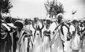 Il s'agit d'une troupe de troubadours berbères du Rif (Imdiazen) lors d'une cérémonie à Ait Touzine dans le Rif au Maroc. Cette photo date des années 50